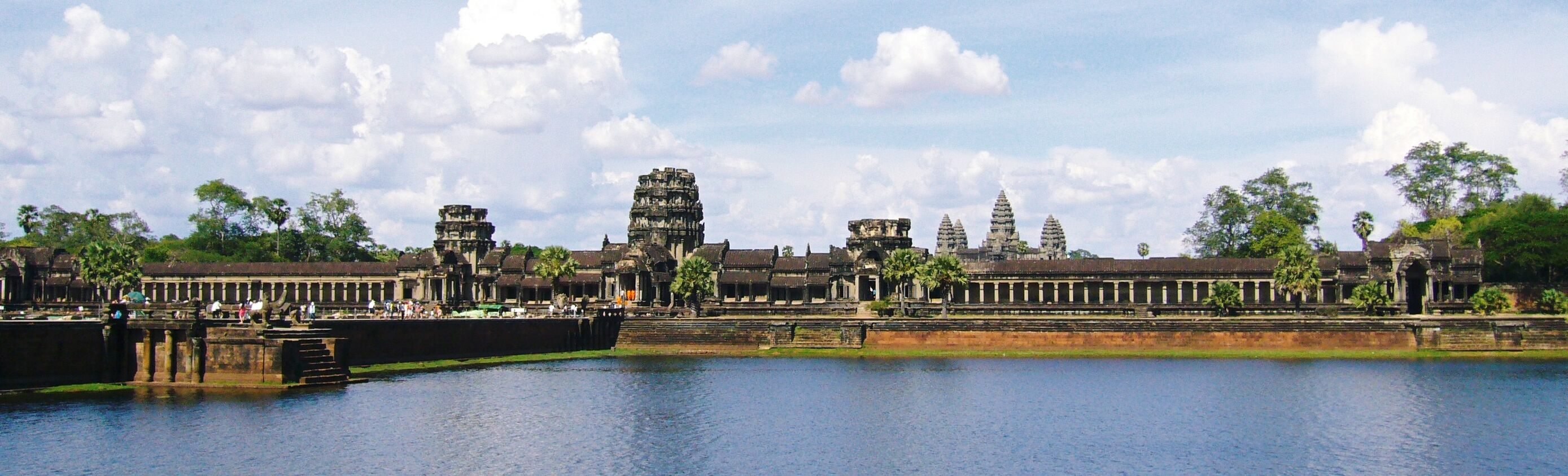 平成十八年五月投稿者撮影